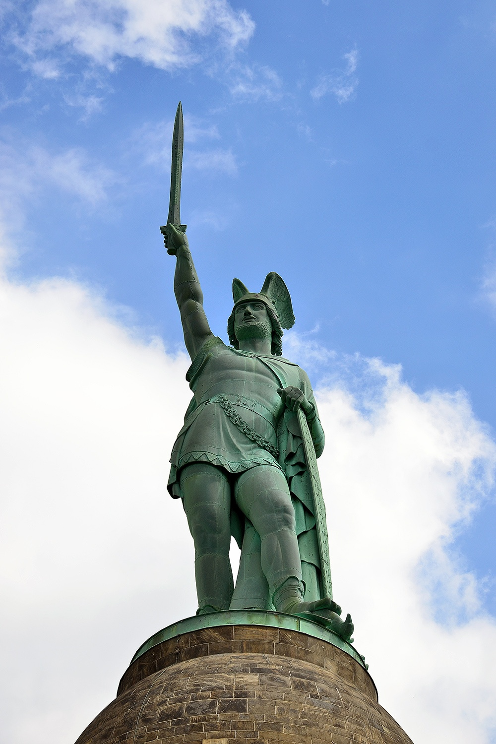 Teutoburger Wald, NRW, Datum/Uhrzeit: 17.08.2013 12:53:42